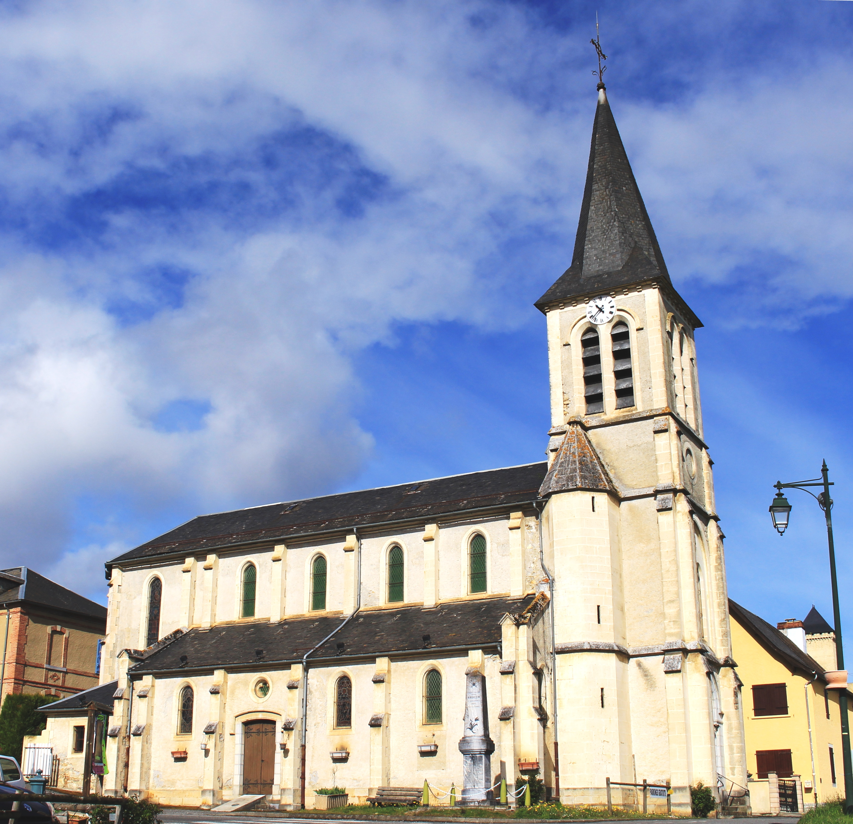 Église Notre-Dame de Mauvezin (Hautes-Pyrénées)